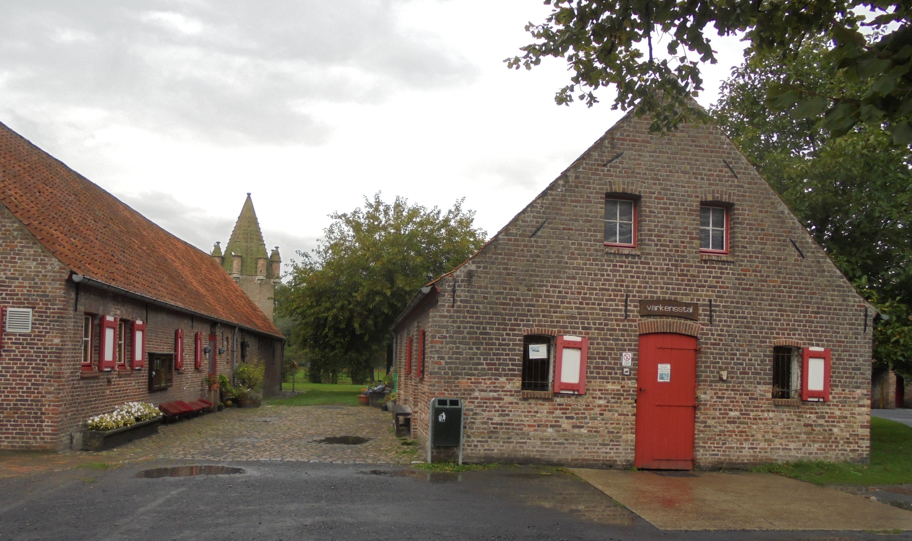 De Zeven Torentjes - Canadaring - Assebroek - Brugge - West-Vlaanderen - België